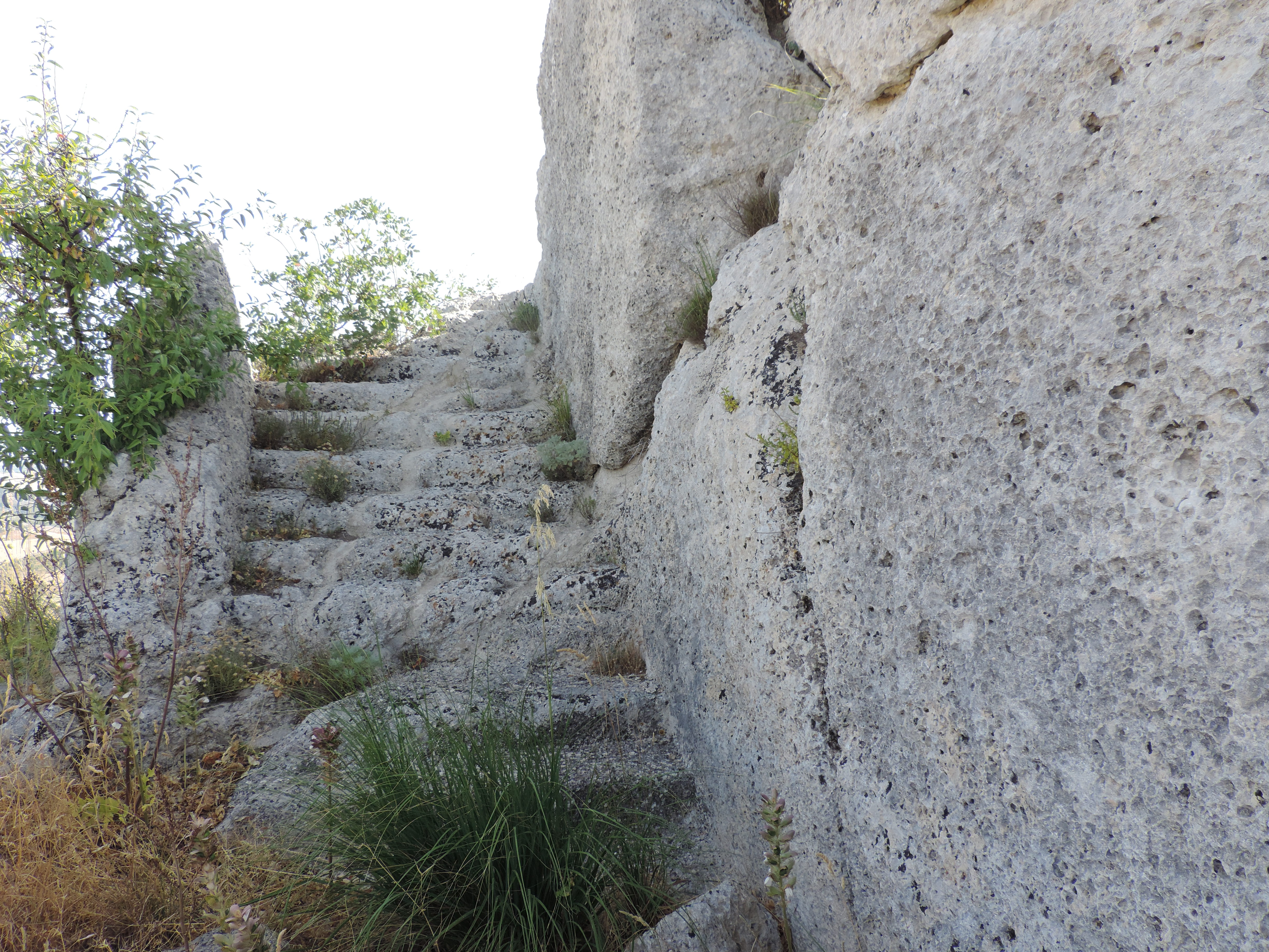 Krastos